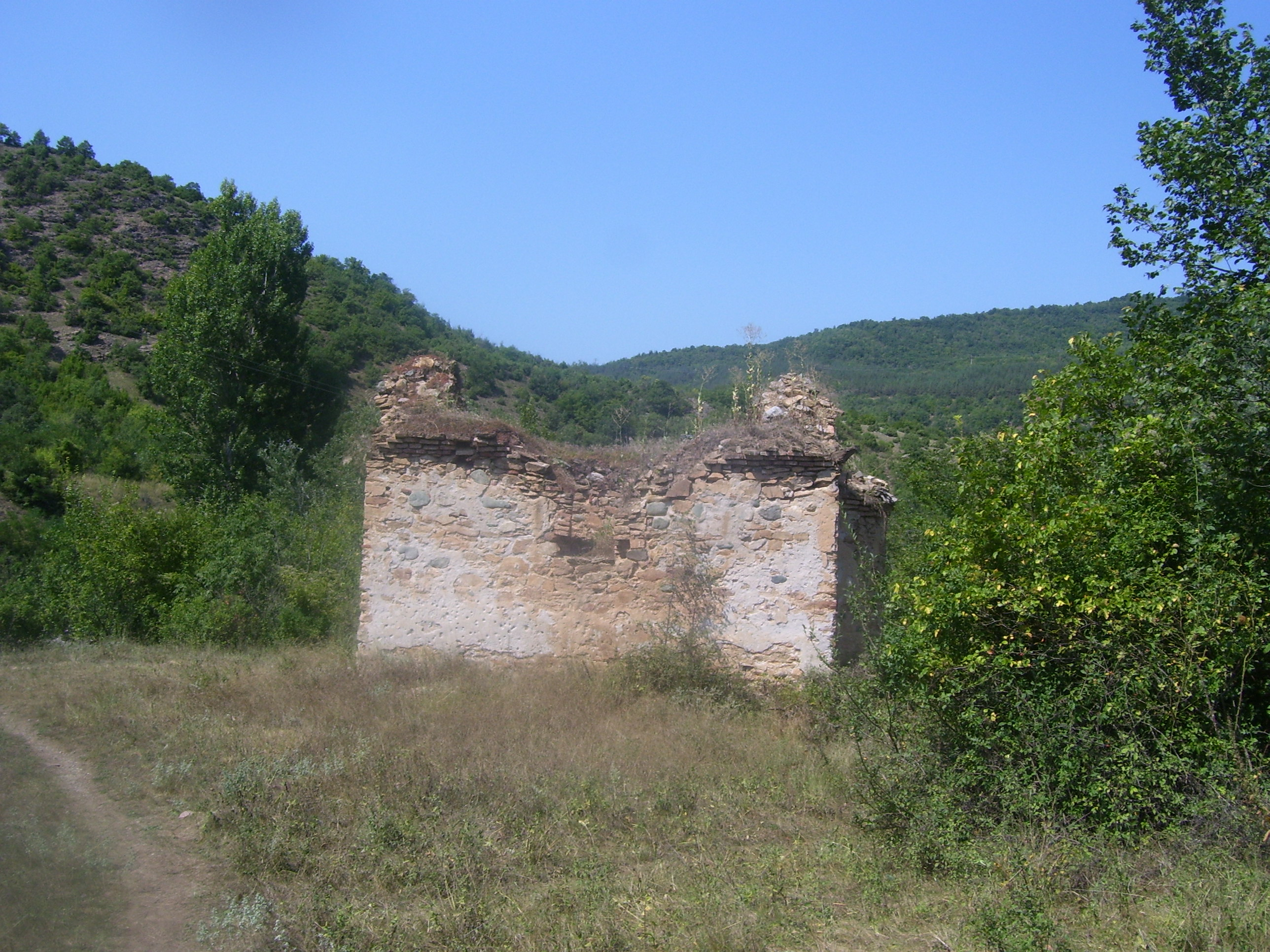 Църквата „Свети Атанасий“ в село Ръждавица, Кюстендилско.